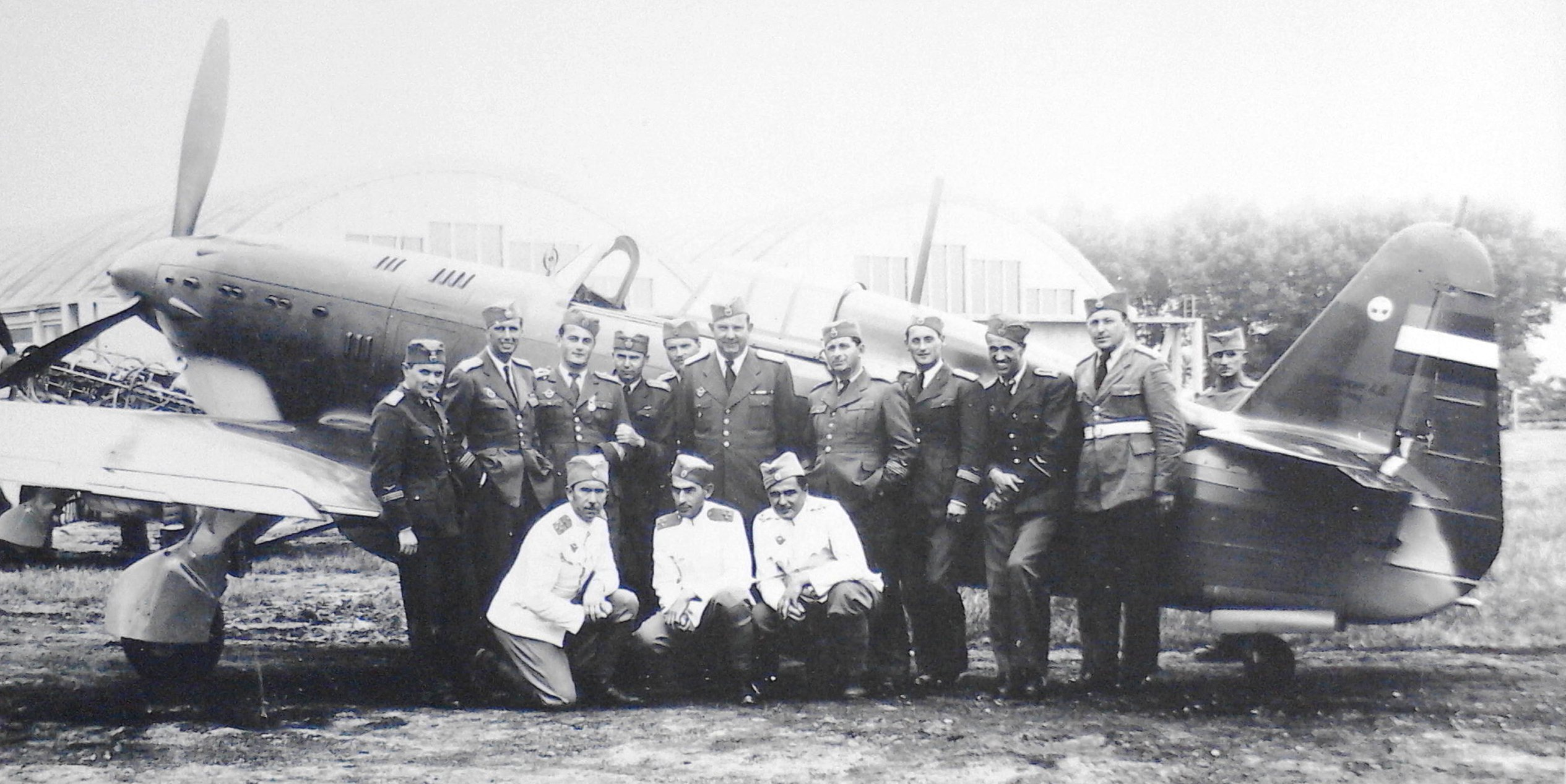 Пилоти 51 групе. Шестог ловачког пука поред ловца ИК3